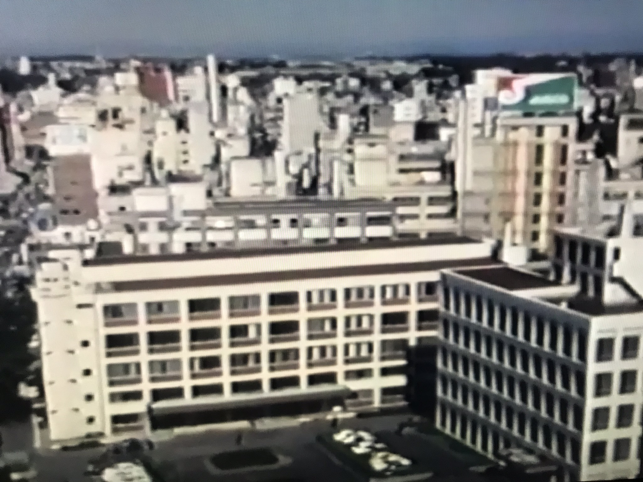 1980年代後半に撮影。正面に見えるのが千葉県庁舎。右奥に見えるのが扇谷ジャスコ千葉店（現きぼーる）。